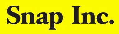 Logo de Snap Inc.